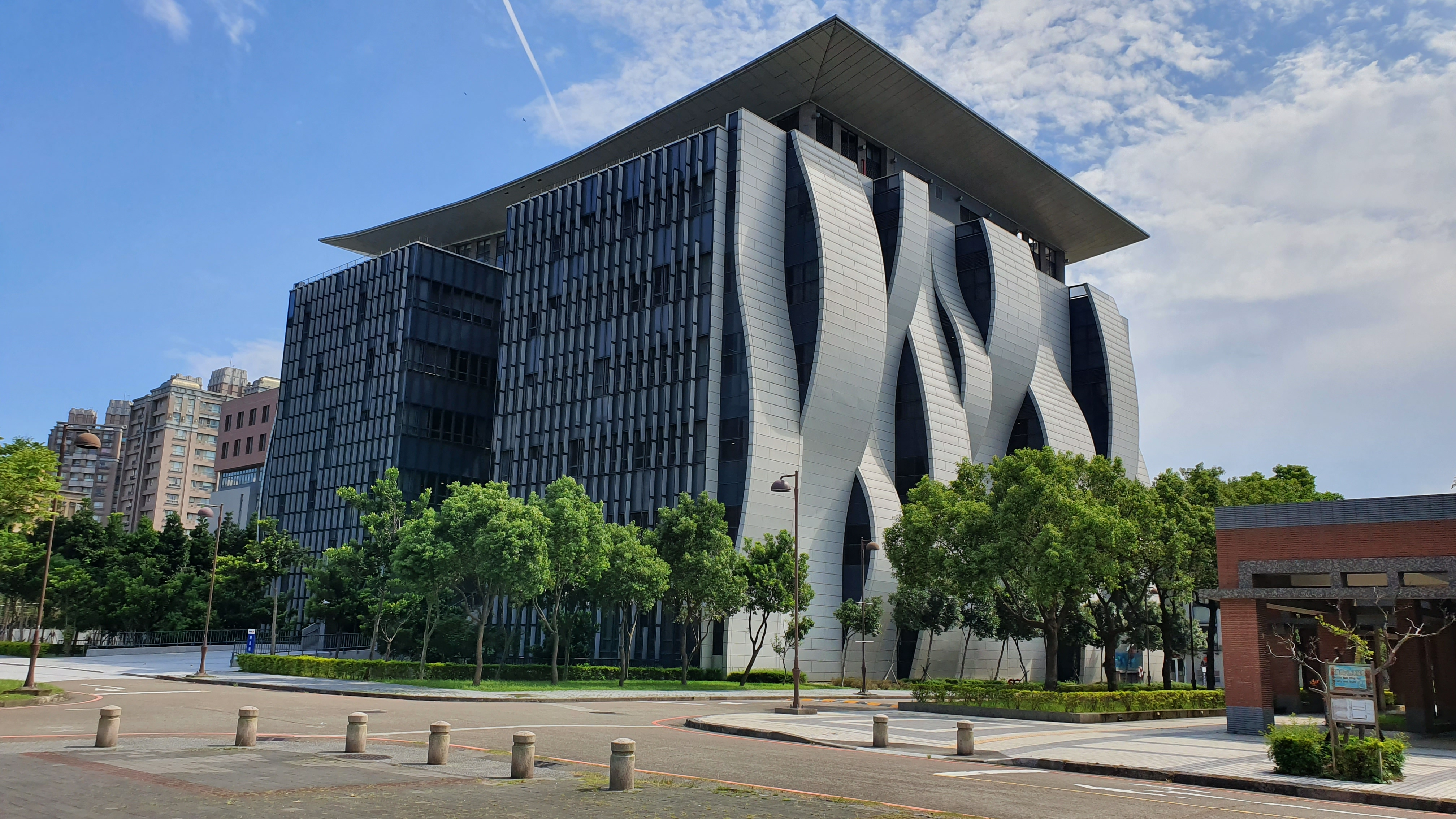 中文（台灣）: NTPU 圖書館總館2019年8月版